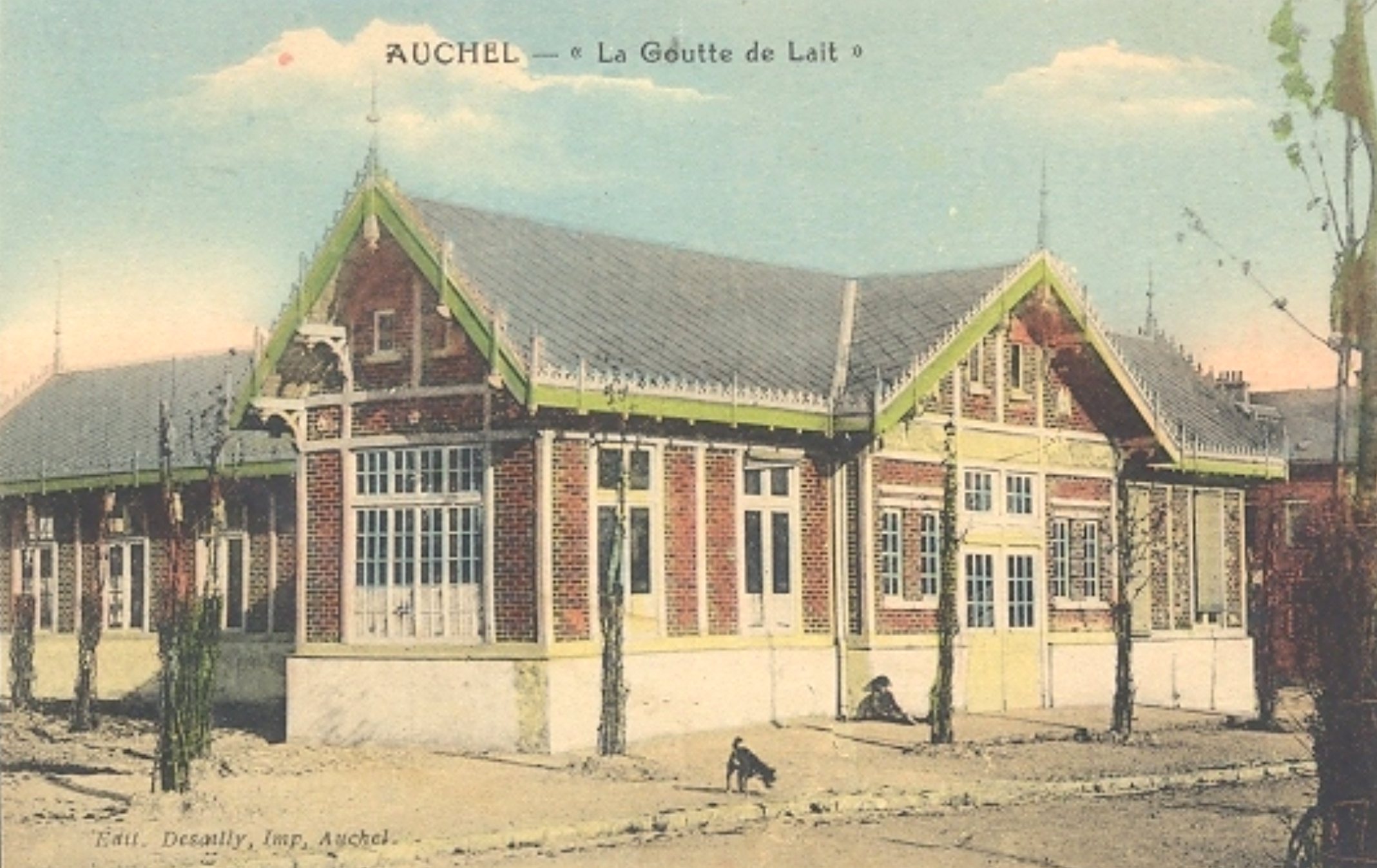 Photochrome de la goutte de lait de la Compagnie des mines de Marles, Auchel, Pas-de-Calais, Nord-Pas-de-Calais, France.